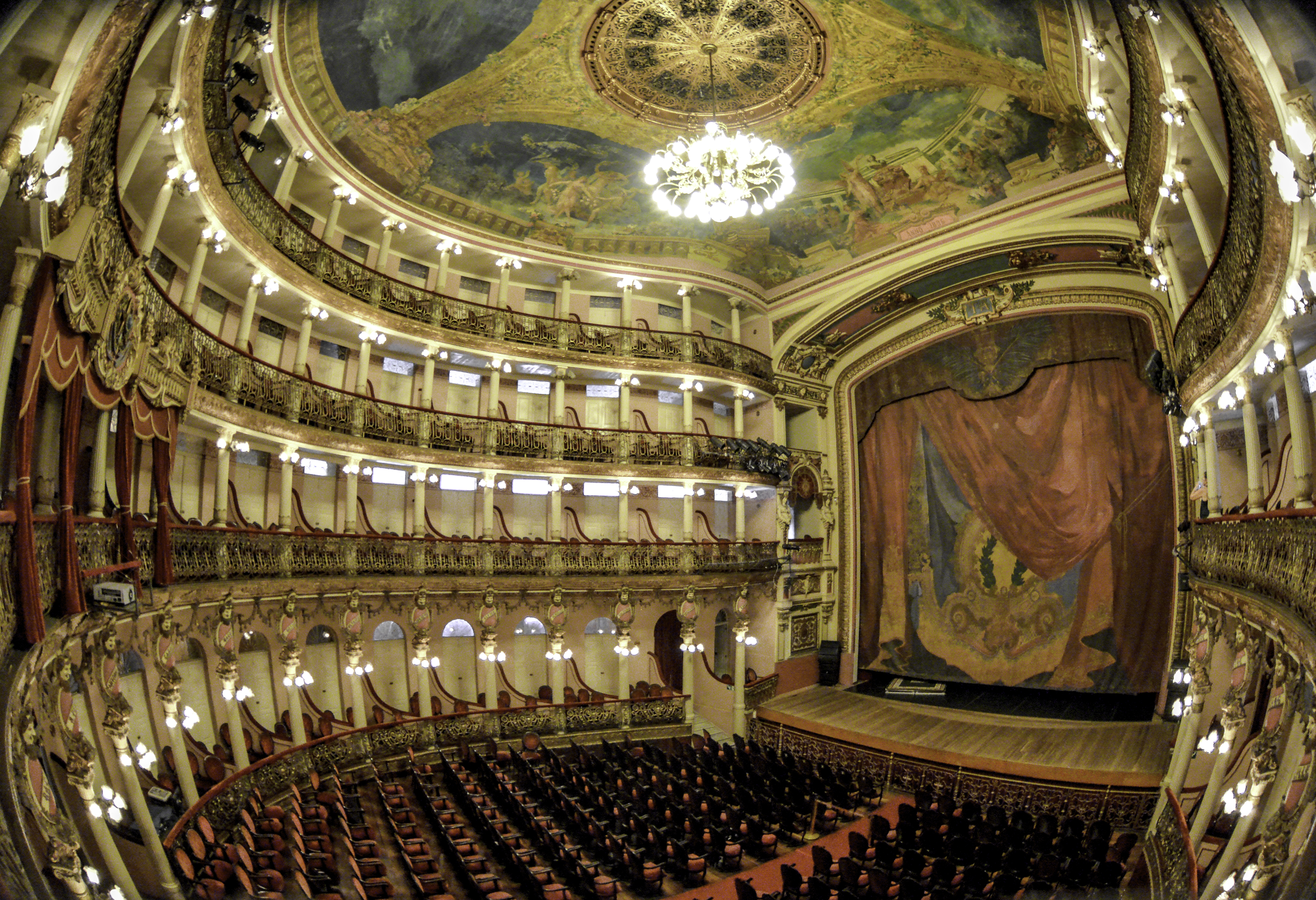 Camarotes e toda arquitetura secular do Teatro Amazonas